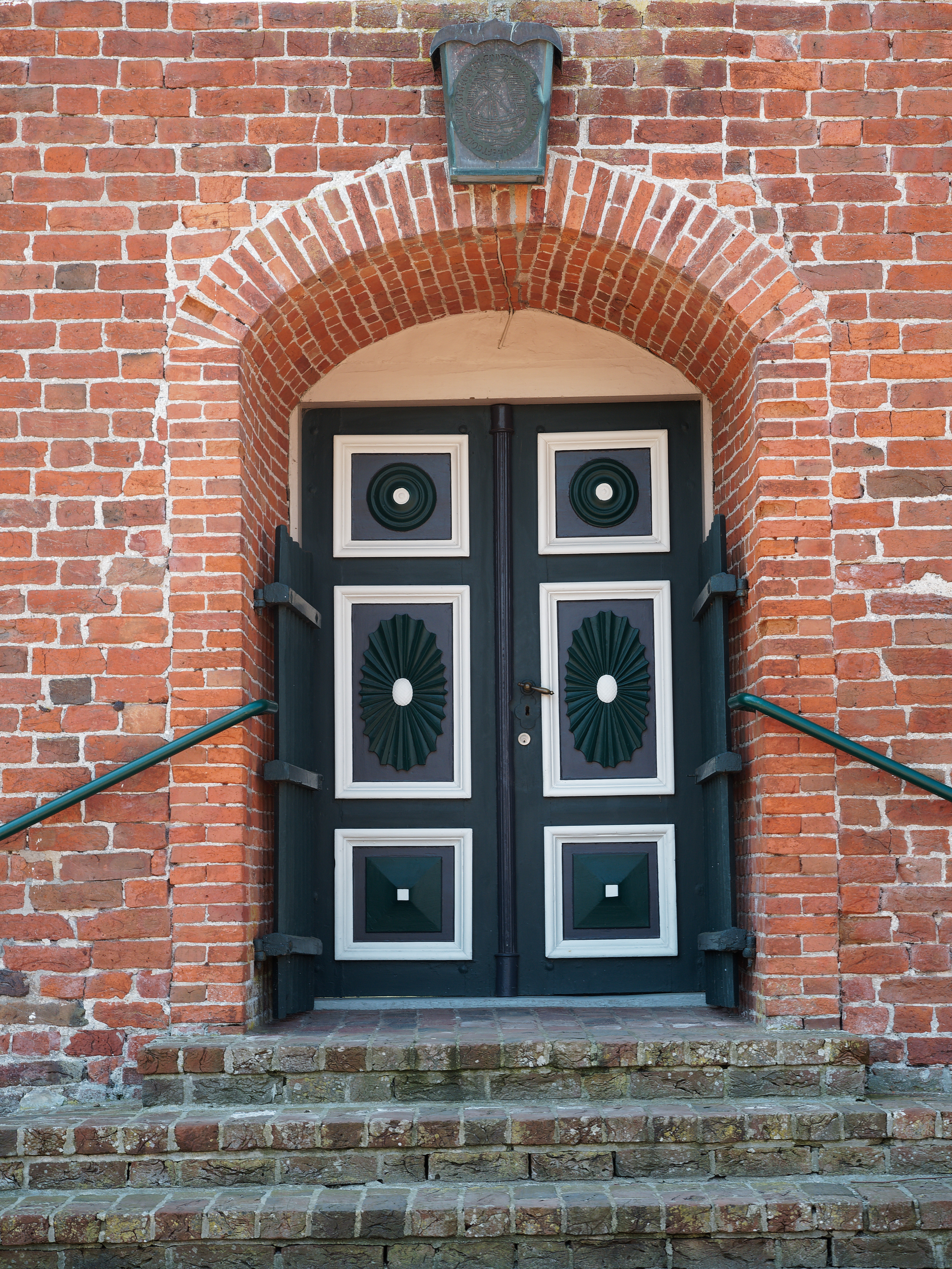 Die Kirchentür an der Ostseite der ev. reformierten Kirche in Uttum (Ostfriesland).